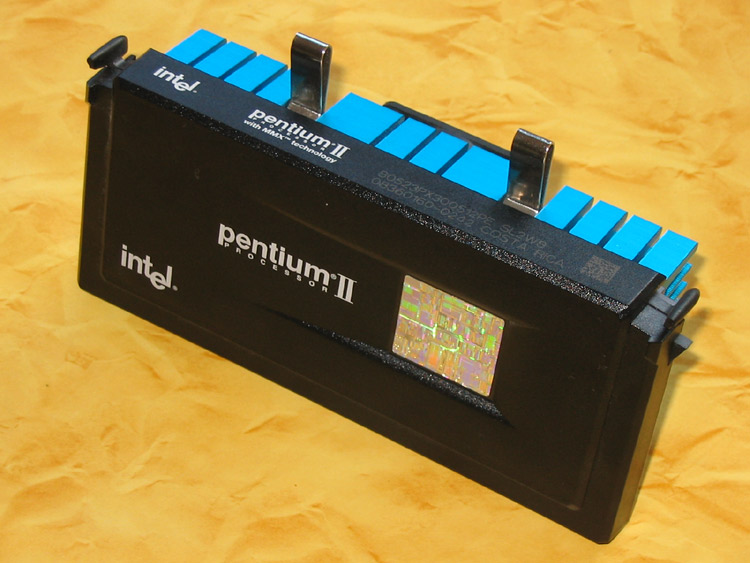 Pentium II-Prozessor 300 MHz der "Übertakter"-Bauart SL2W8